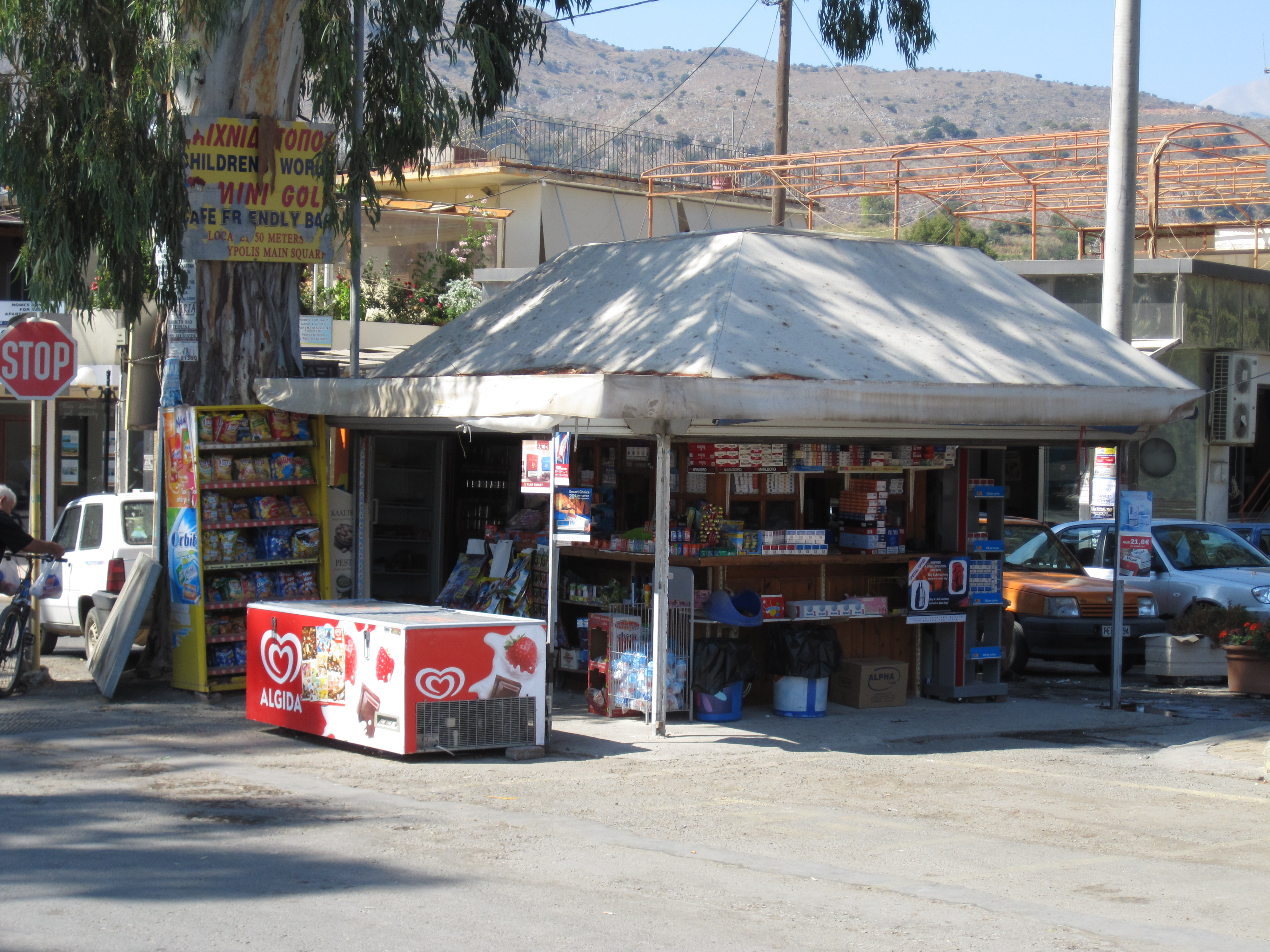 Kiosk in Georgioupolis/Kreta